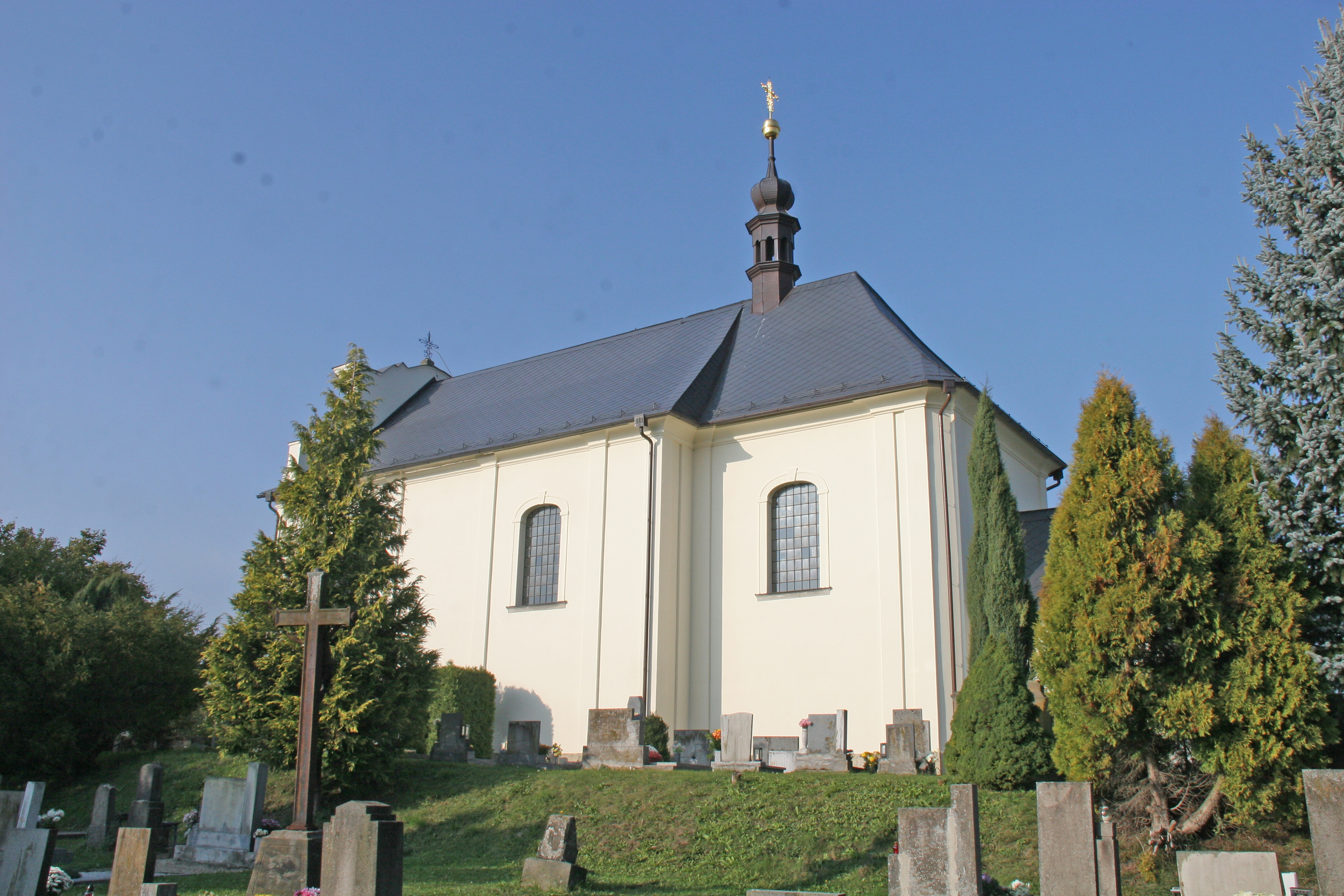 Kostel svatého Jiří, jihovýchodně od obce, na hřbitově, Radhošť (okres Ústí nad Orlicí).